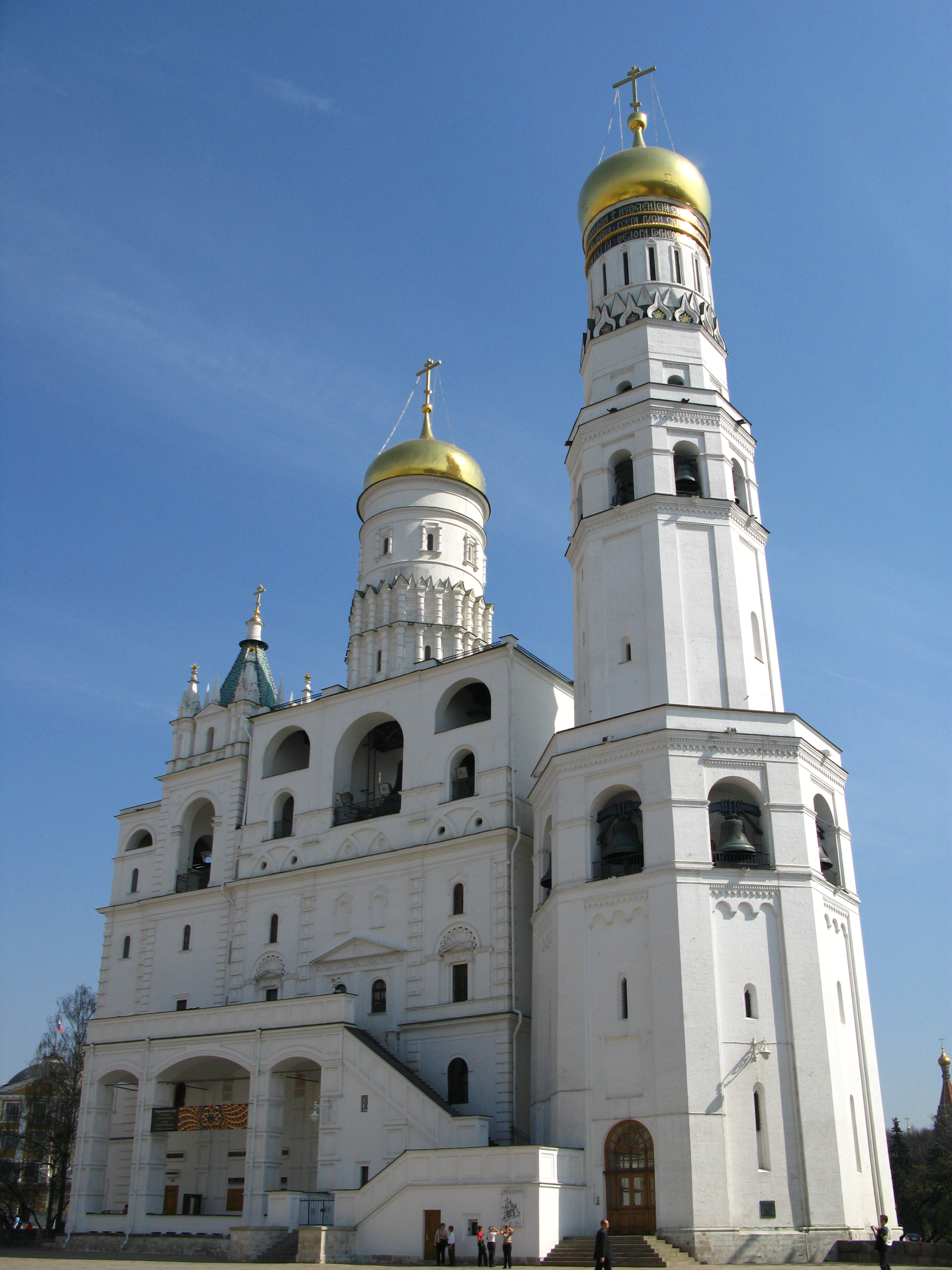 Звоно-торањ Ивана Грозног. Кремељ, Москва.